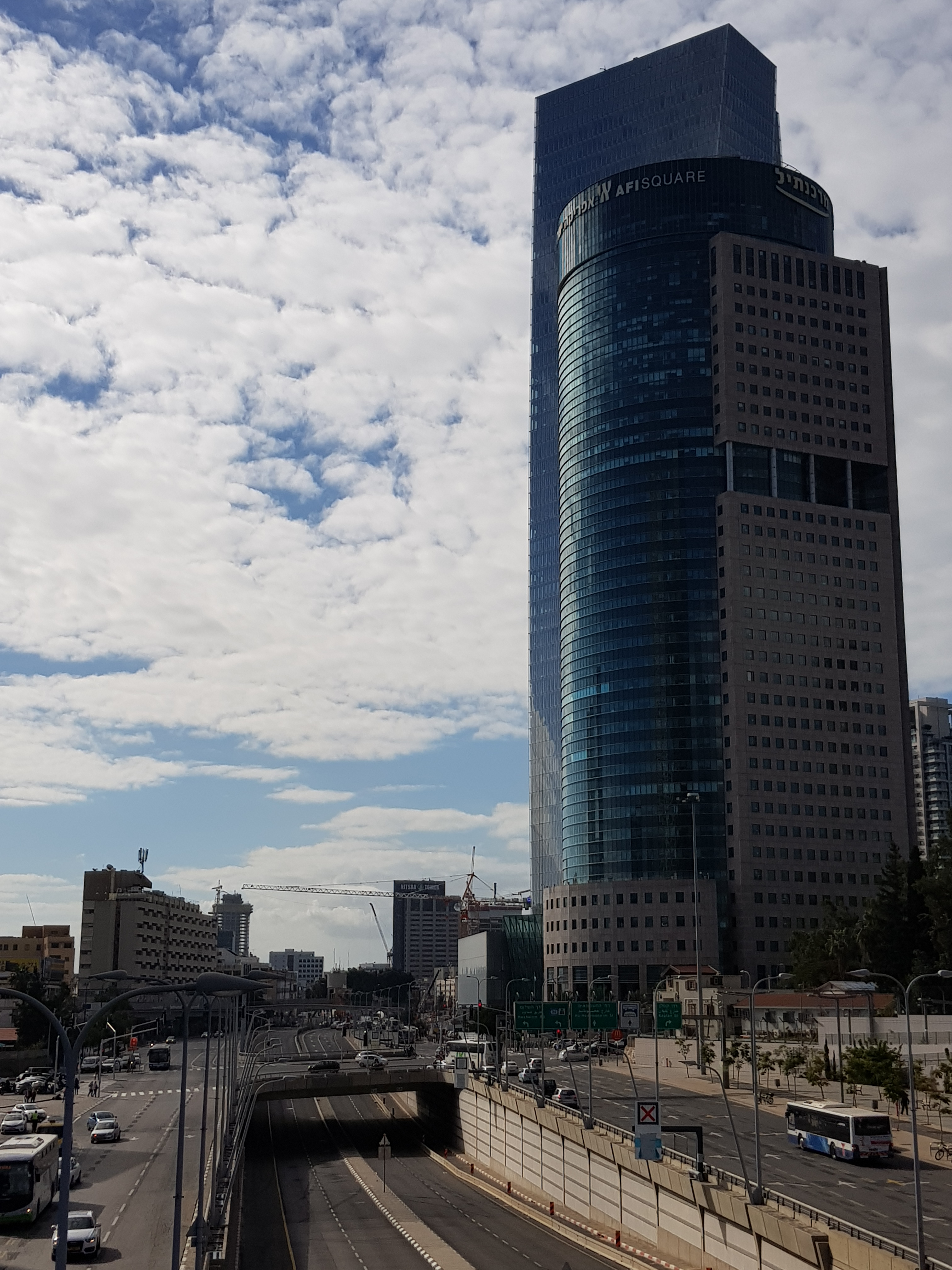 מחלף קפלן ובניין קריית הממשלה בתל אביב